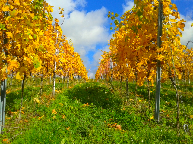 Eine Detailaufnahme von Rebenstöcken